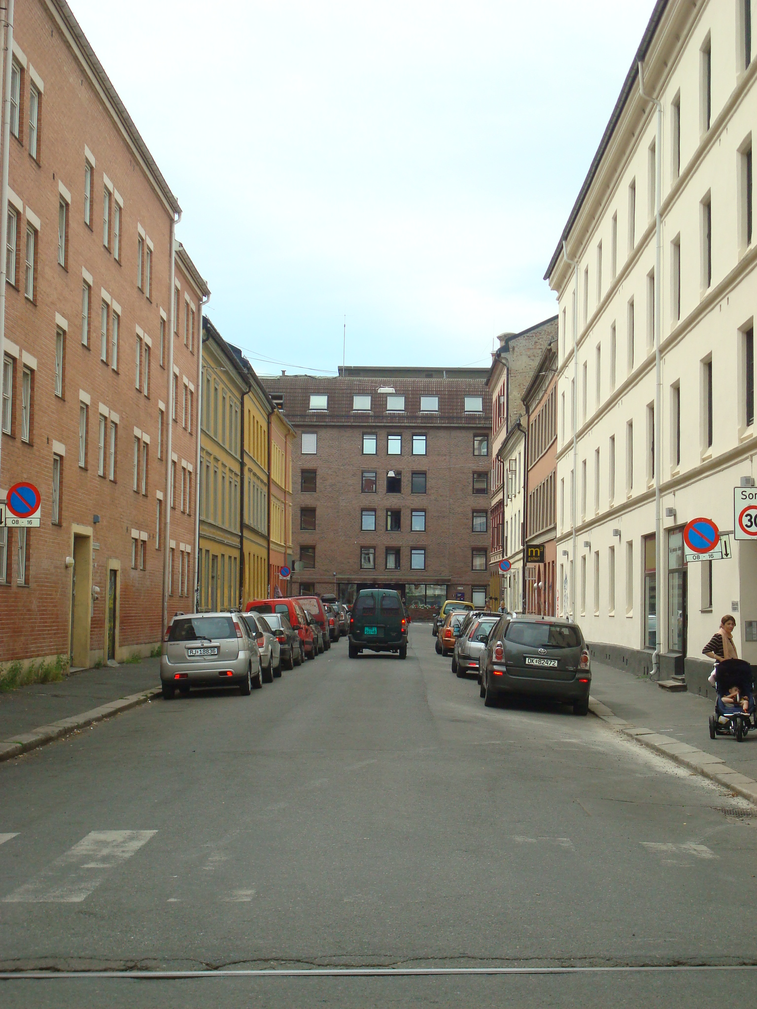 Leirfallsgata i Oslo, sett mot Grünerløkka sykehjem fra Thorvald Meyers gate.